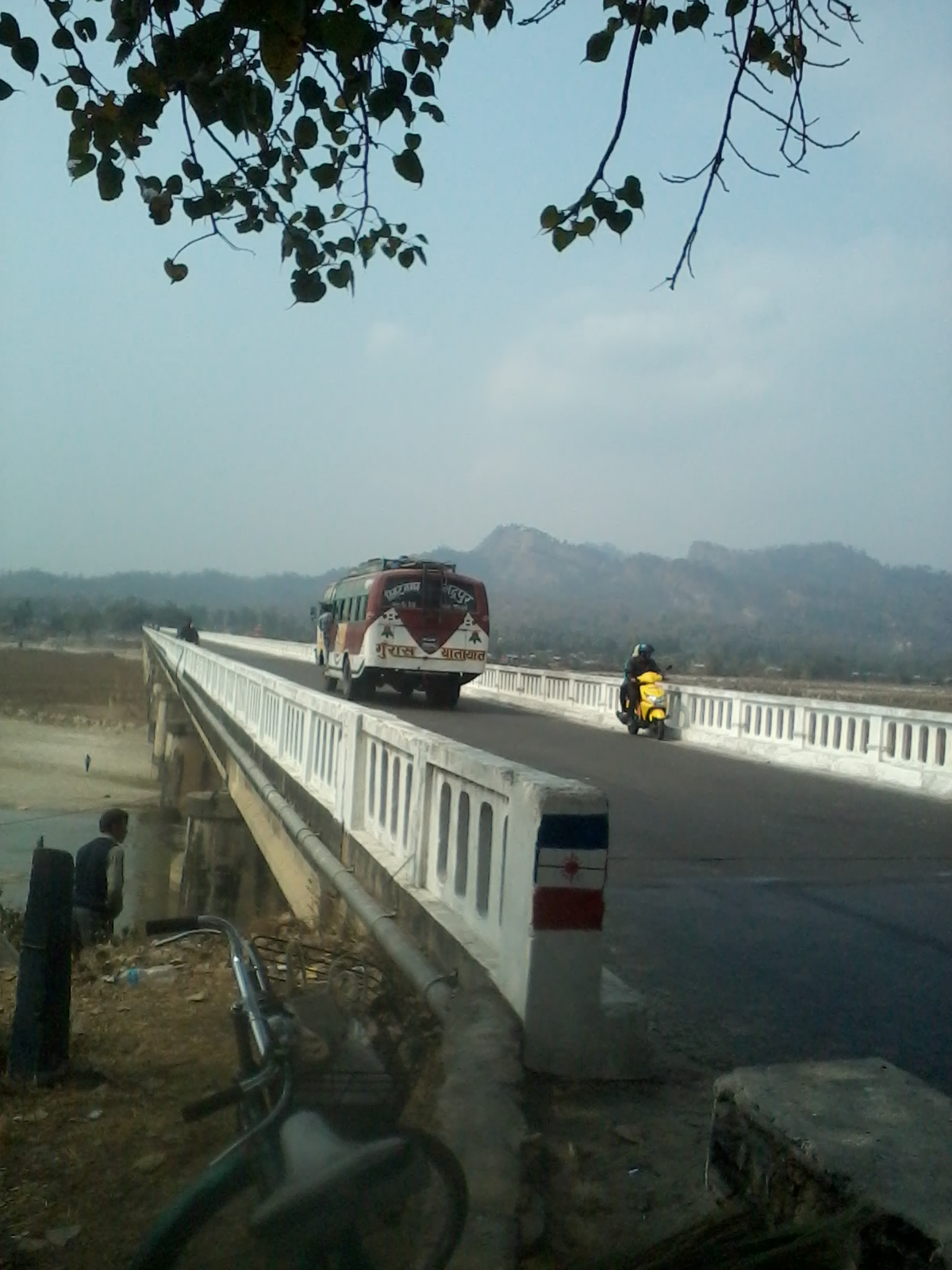 झापाको कन्काई नदीमा बनेको नेपालको सबै भन्दा लामो पुल